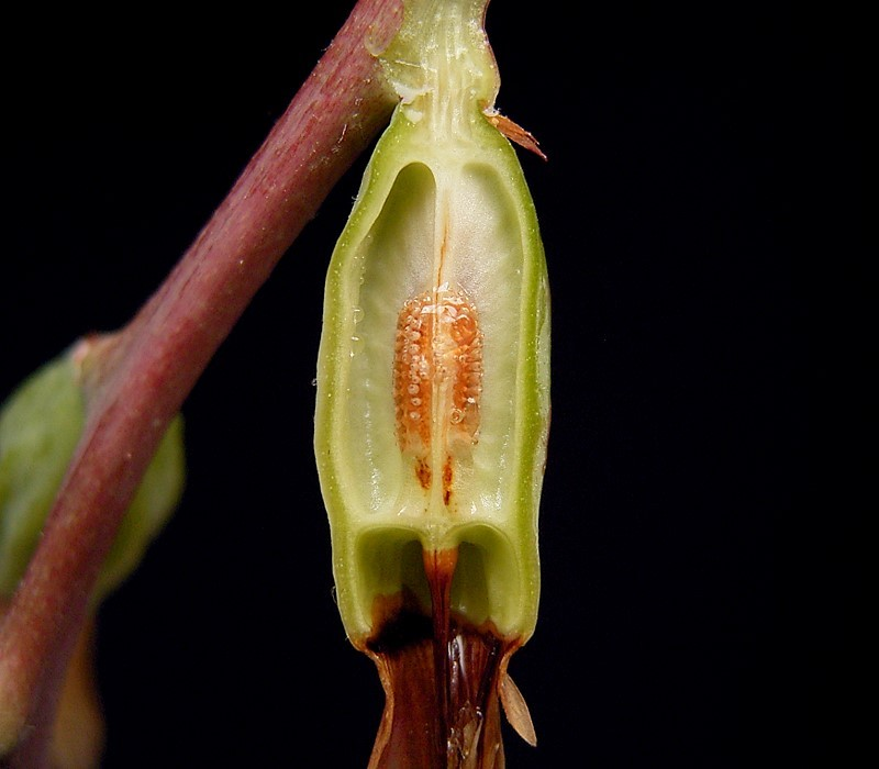 Billbergia x windii